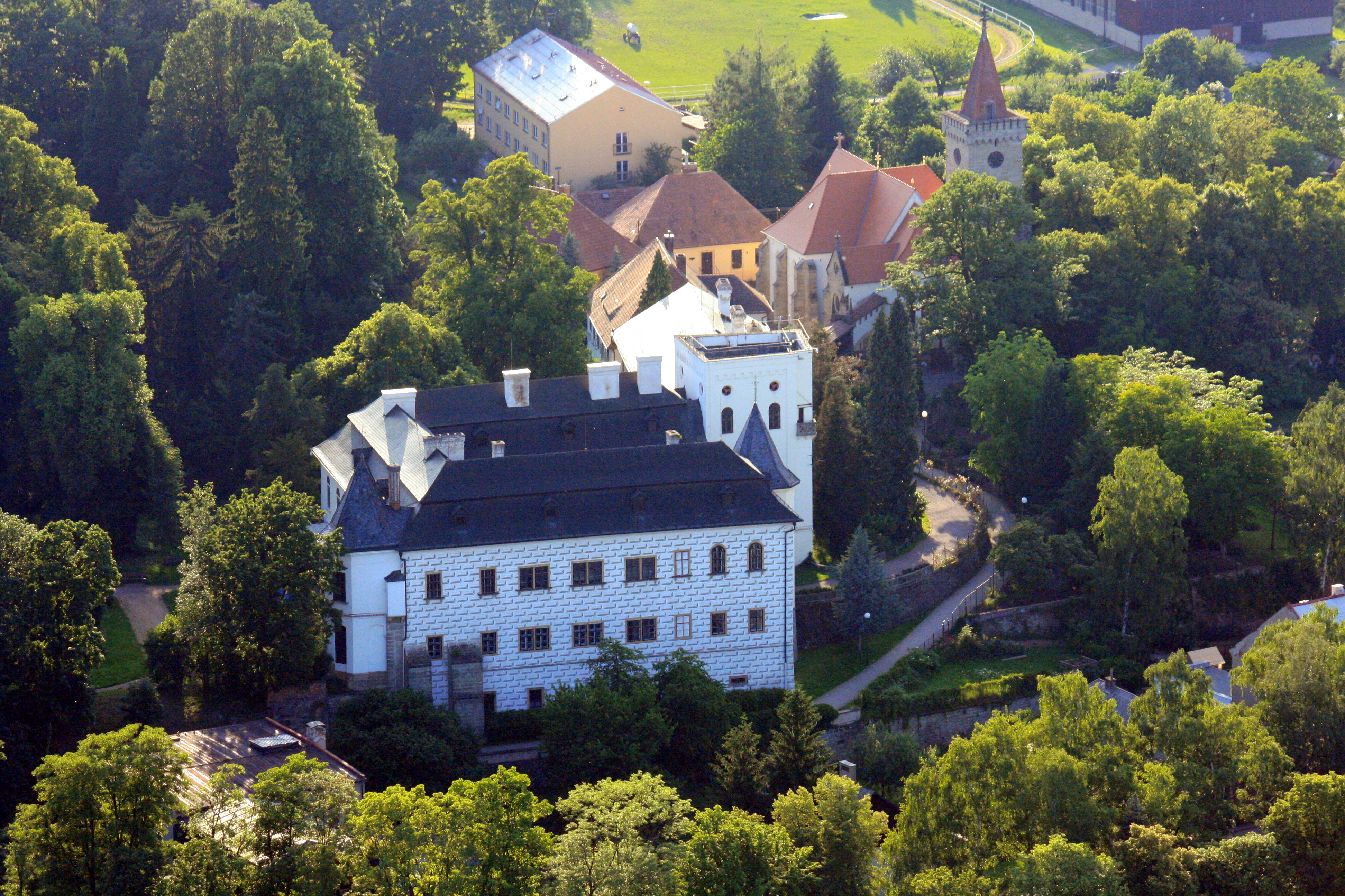 Zámek Slatiňany od východu